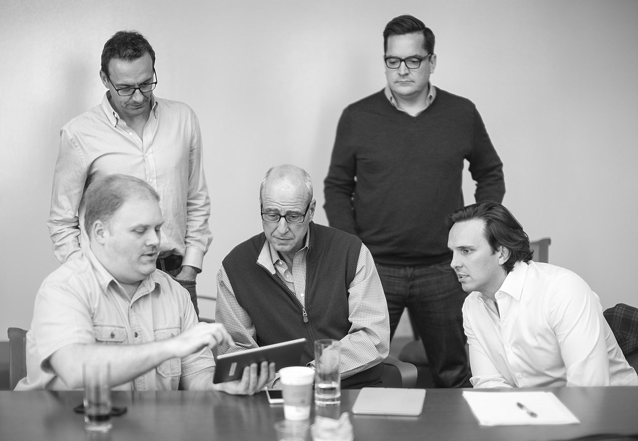 Joe Horowitz, Jafco